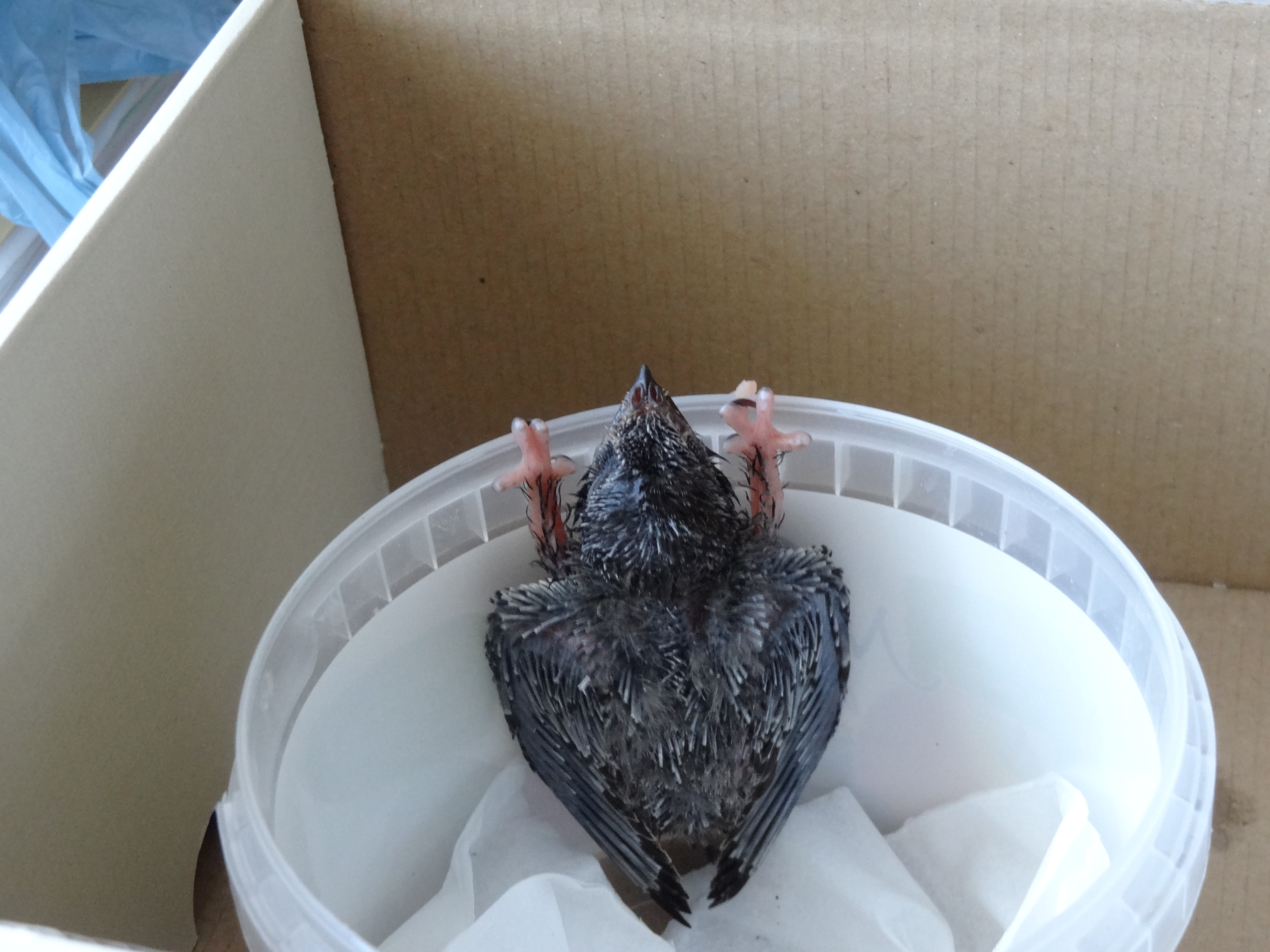 Młody jerzyk - sam wlazł i tak się ustawił w pojemniku